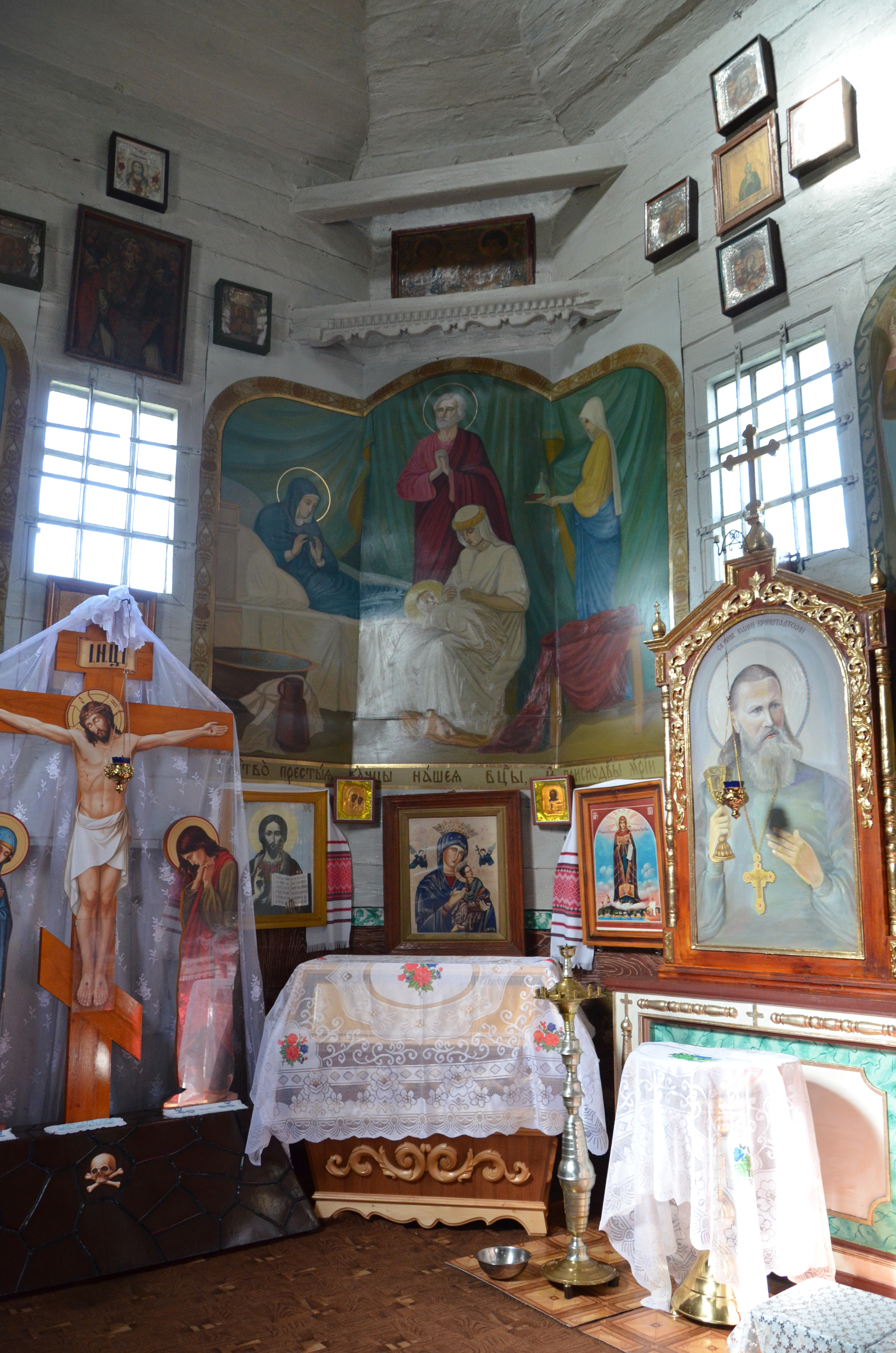 Миколаївська церква (дер.), село Синява